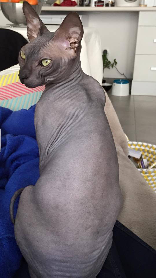 chat mâle donskoy